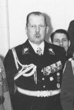 Gruppenführer Wilhelm Reinhard (1869-1955)